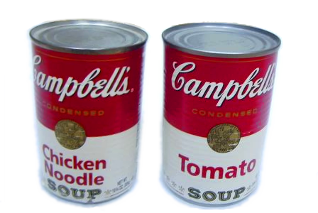 Image Campbells.jpg détourée et éclaircie (essai 1)